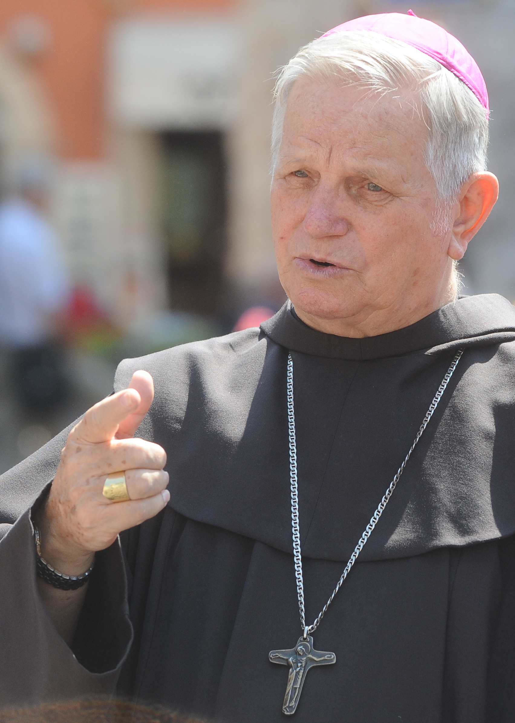 Il vescovo ausiliario di Lima Adriano Tomasi (Padre Pachi) a in Piazza Duomo a Trento, sua città d'origine.